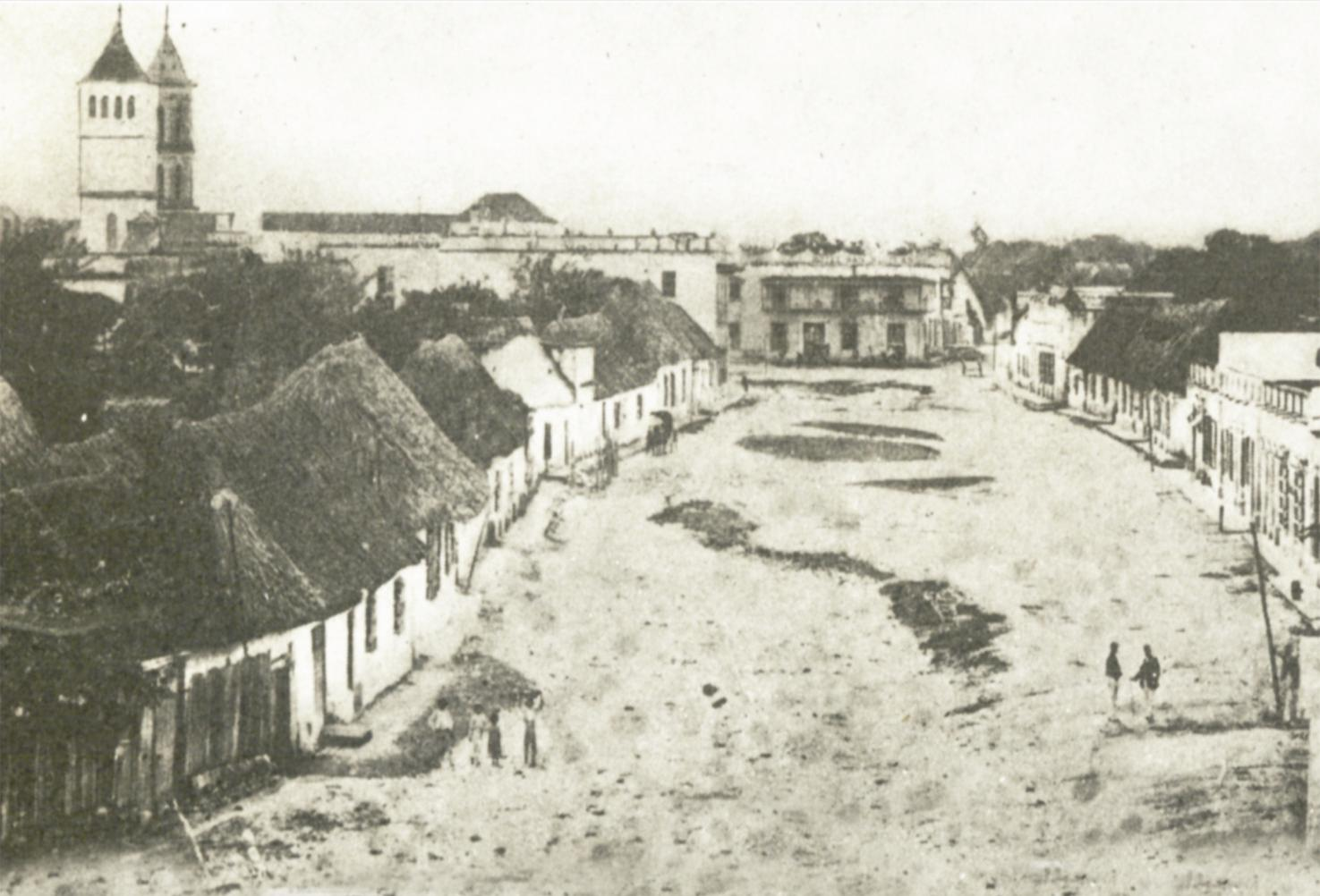 Ancienne rue "Calle Ancha"" (aujourd'hui appelée Paseo de Bolívar). Il s'agit d'une des premières photos répertoriées de Barranquilla.